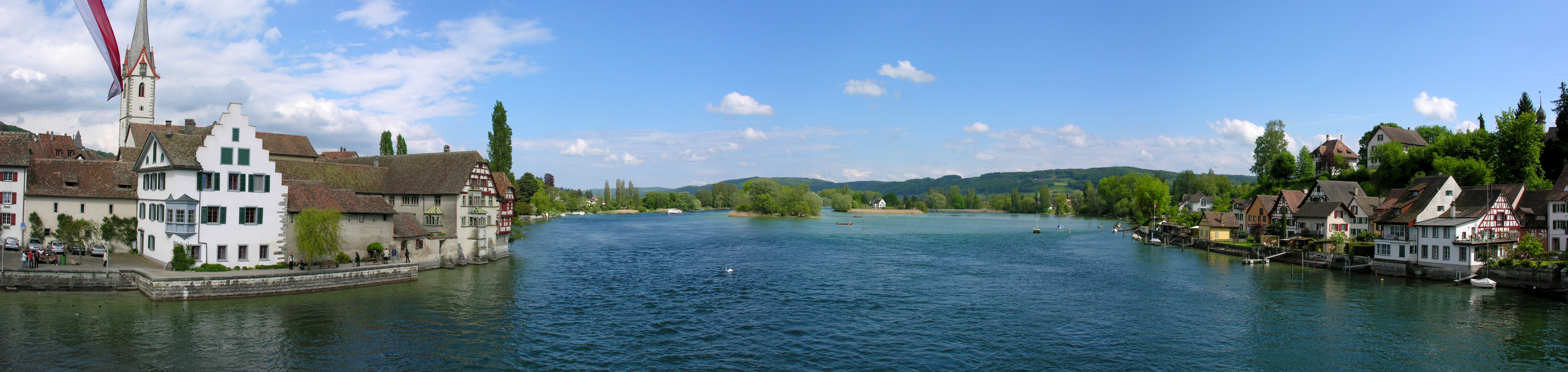 Stein am Rhein